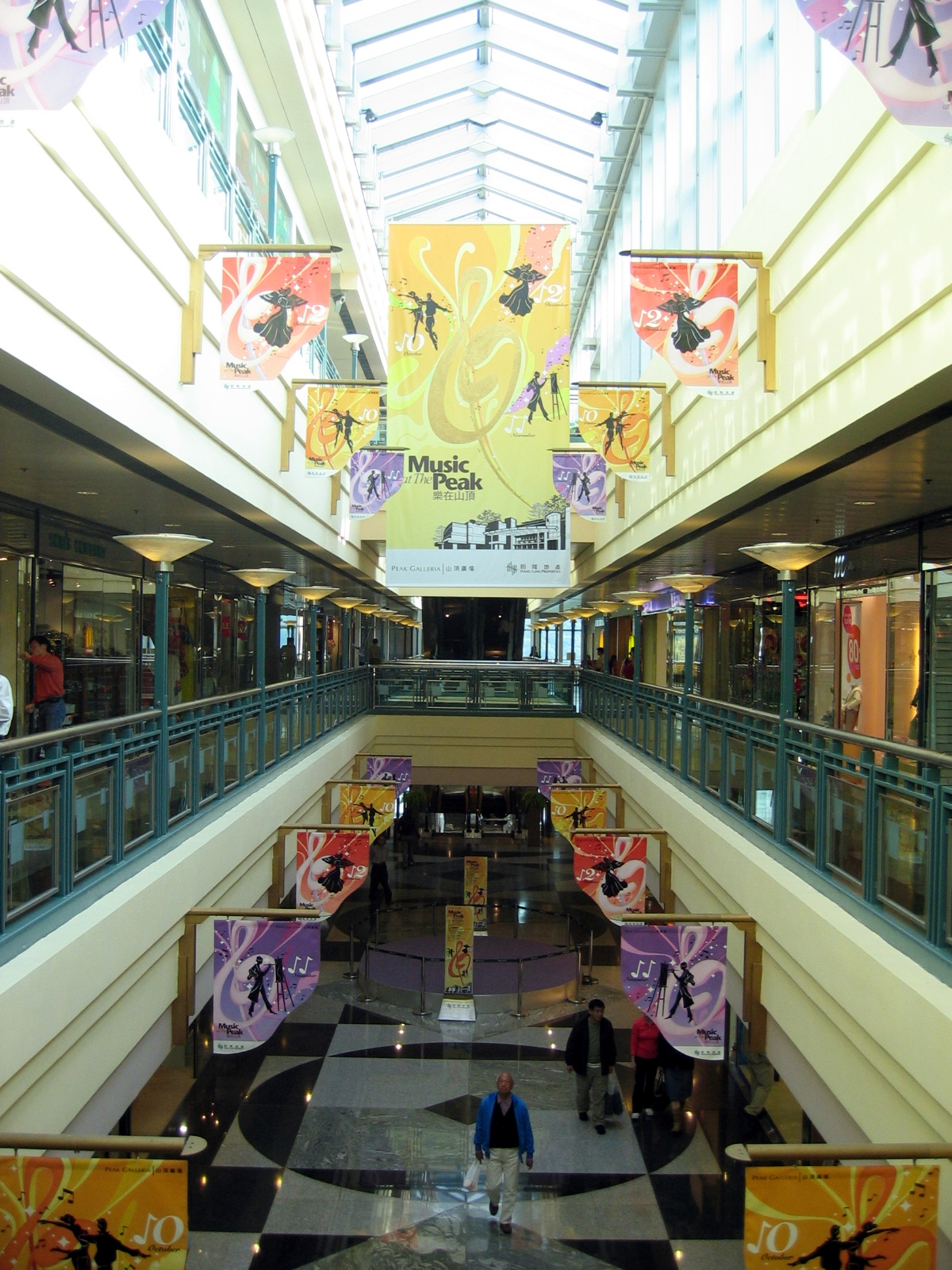 HK Peak Gallera Void 山頂廣場